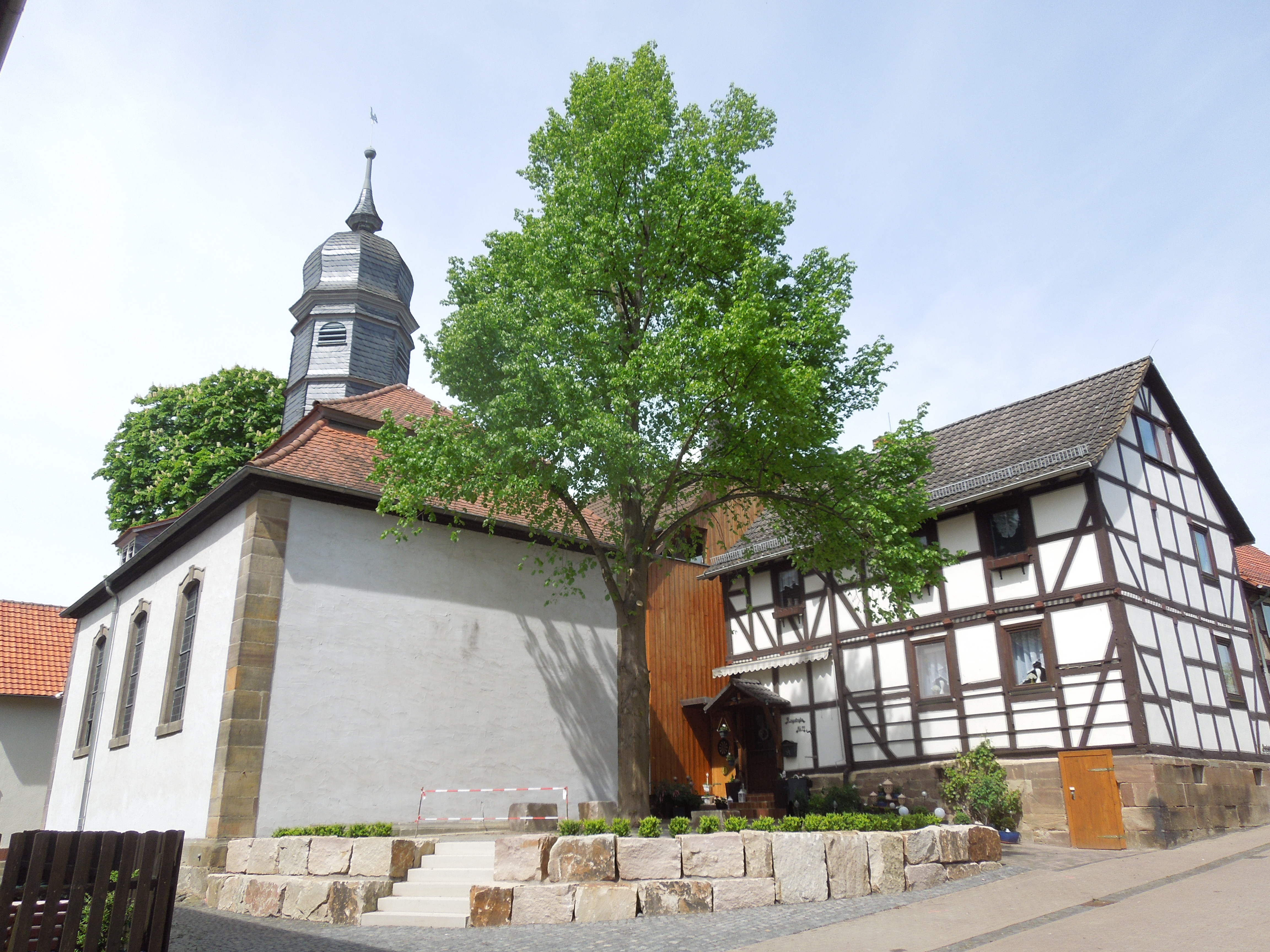 Dorfkirche und Fachwerkhaus im Gudensberger Stadtteil Dorla